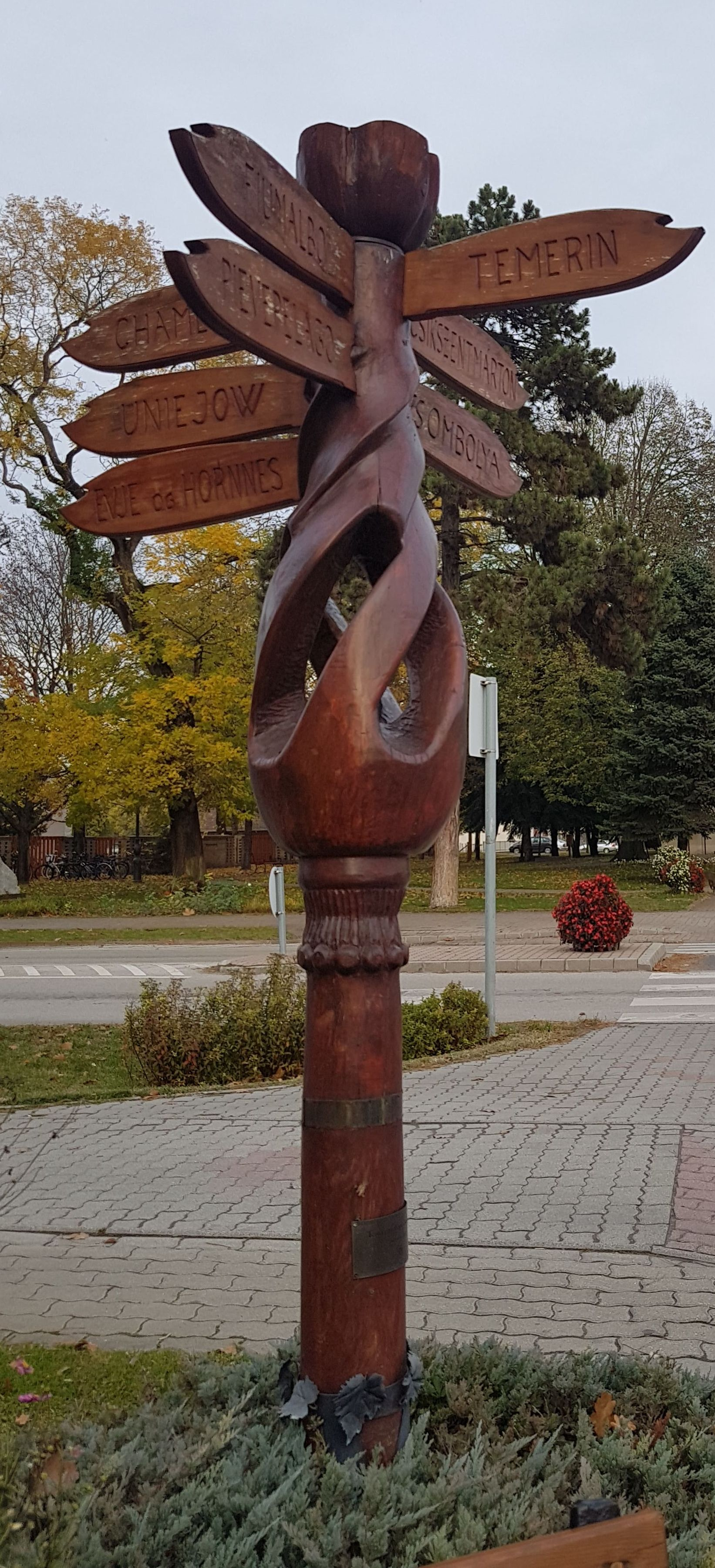 Szász Gyula (fafaragó és festőművész, Zákányszék) által 2004. július 10-én felállított (azóta bővült) Mórahalom testvérvárosainak fája, 2019 novemberében. Chamerau (Németország); Pievepelago (Olaszország); Fiumalbo (Parco del Frignano); Csíkszentmárton (Románia – Erdély, Székelyföld); Temerin (Szerbia – Délvidék); Uniejów (Lengyelország); Evje og Hornnes (Norvégia); Zsombolya (Románia) irányába mutató nyilakkal.